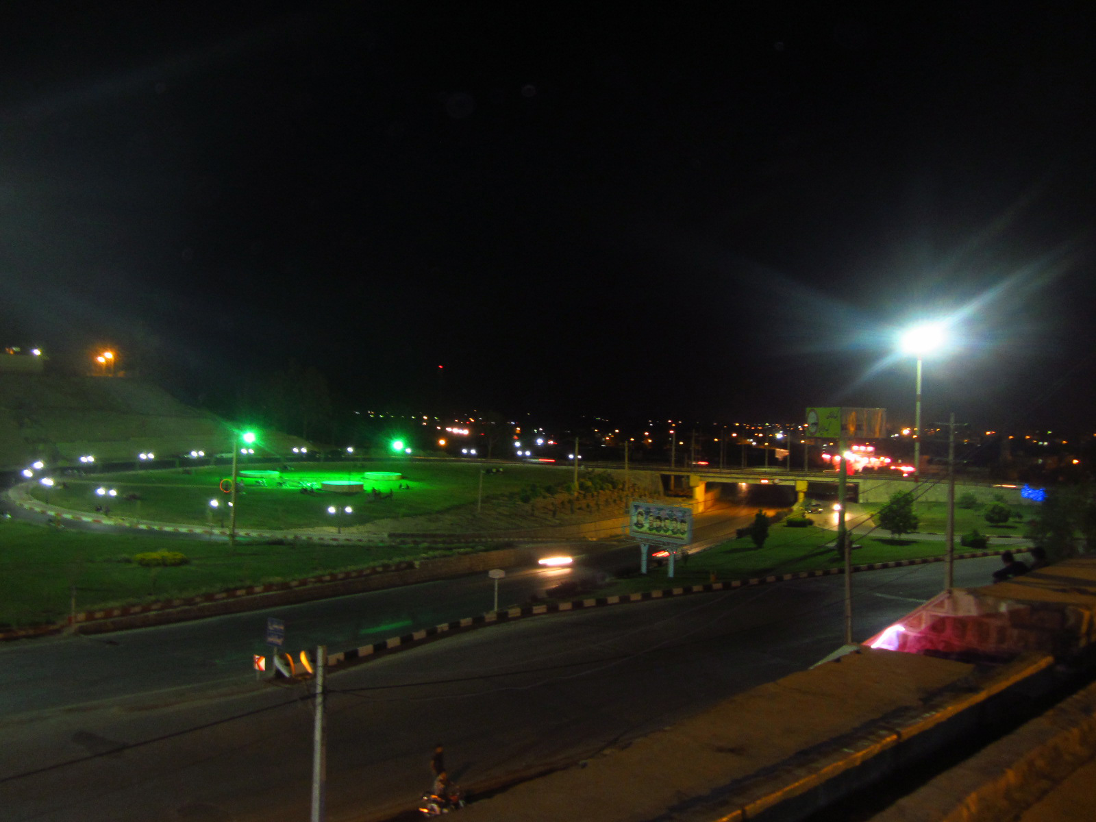 Fasa